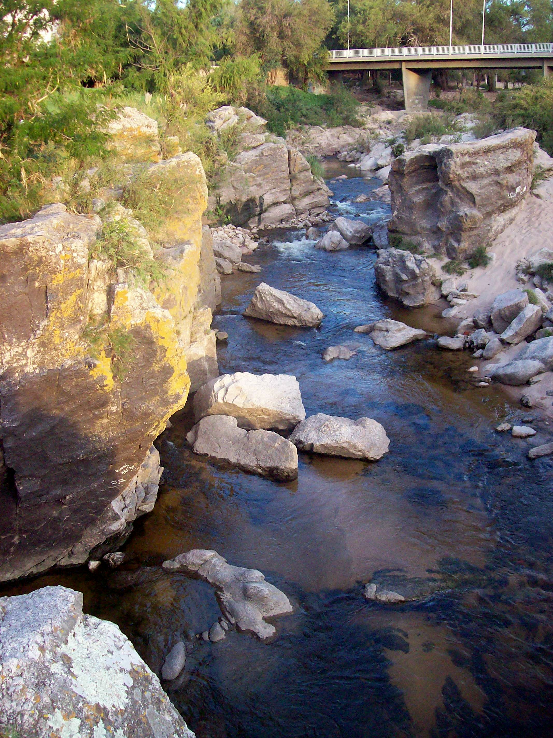 Zona de "Los Cajones", donde el río Mina Clavero, llega a la desembocadura del río Panaholma (pequeña entrada a la izquierda de la foto) para convertirse en el río de los Sauces (abajo), en Mina Clavero, provincia de Córdoba, Argentina.